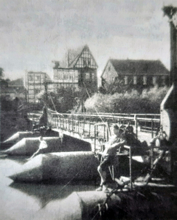 Kampmannbrücke in Essen, ehem. Pontonbrücke